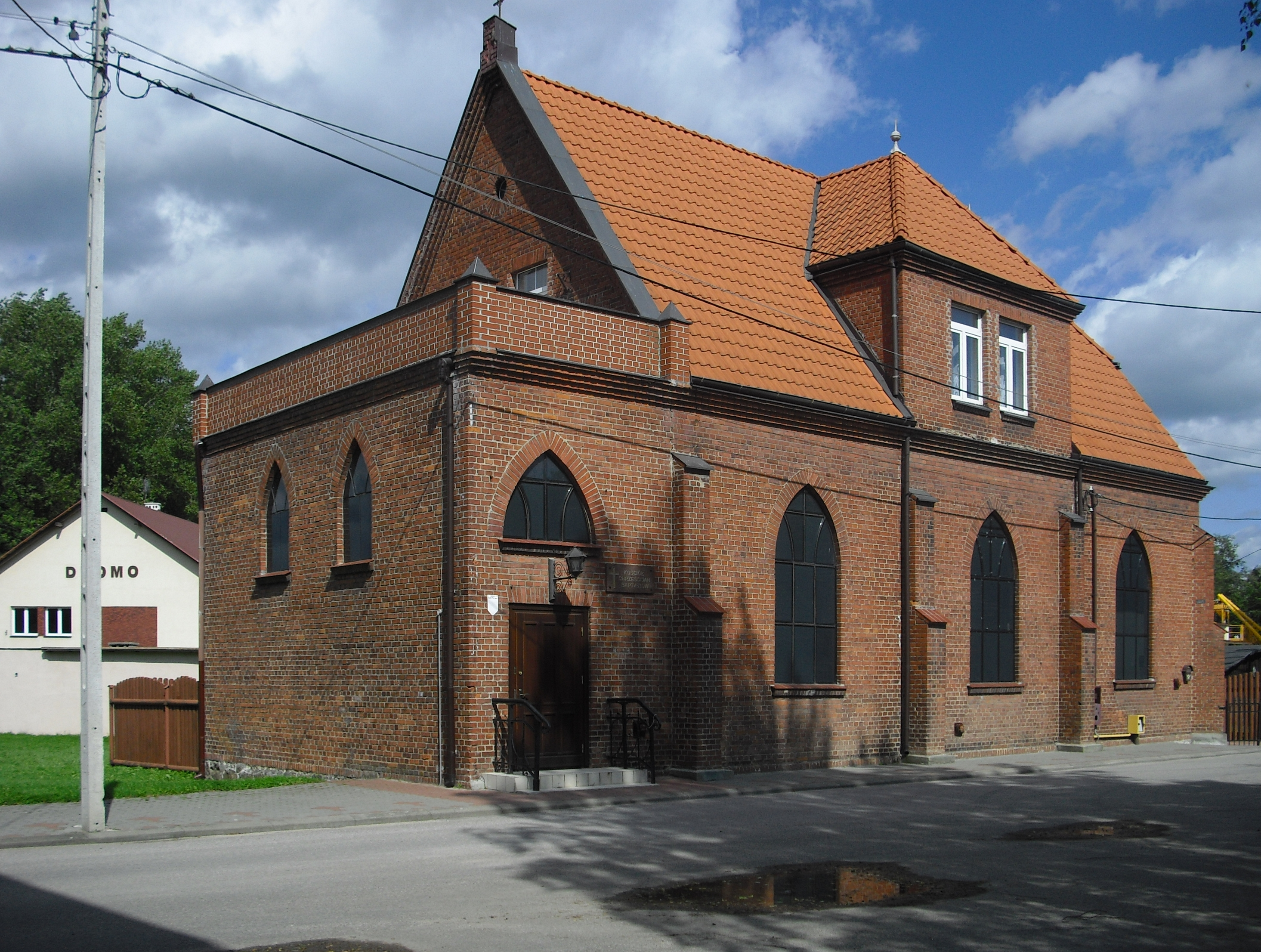 Ostróda - kaplica baptystów przy ul. Nadrzecznej 3